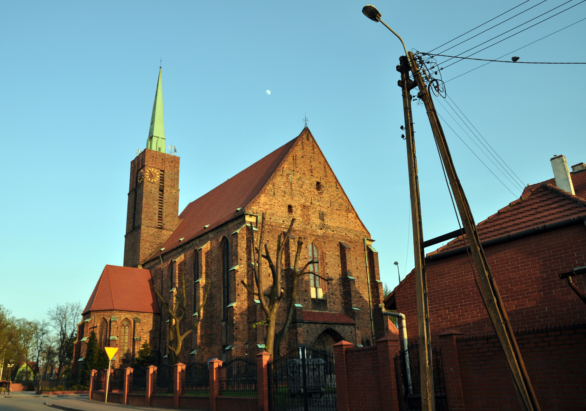 Środa Śląska - kościół p.w. św. Podwyższenia Krzyża, poł. XIV, XIX/XX, 1933-35 (zabytek nr rejestr. A/1182/1234)